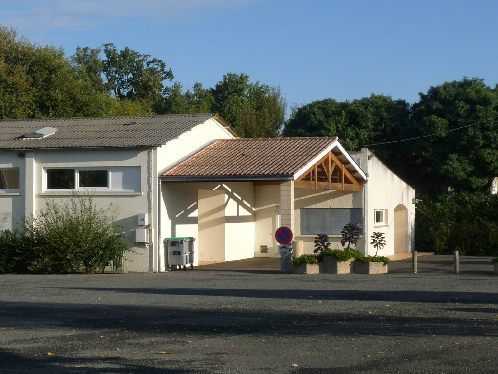 Salle des fêtes, Mérignac, Charente-Maritime, France